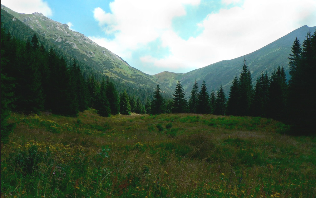 Kopské sedlo od západu.